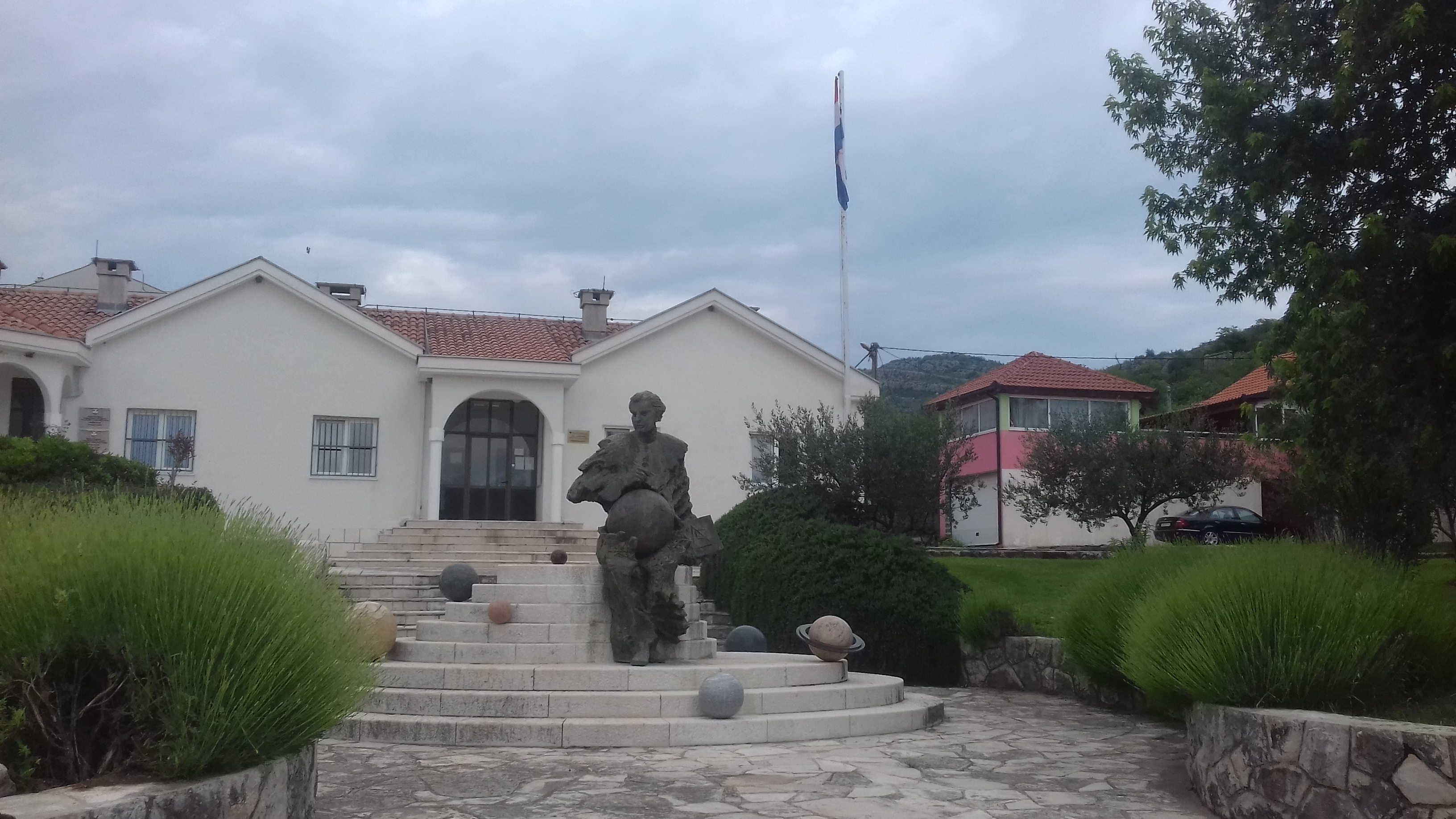 Spomenik Ruđeru Boškoviću u središtu Ravnog